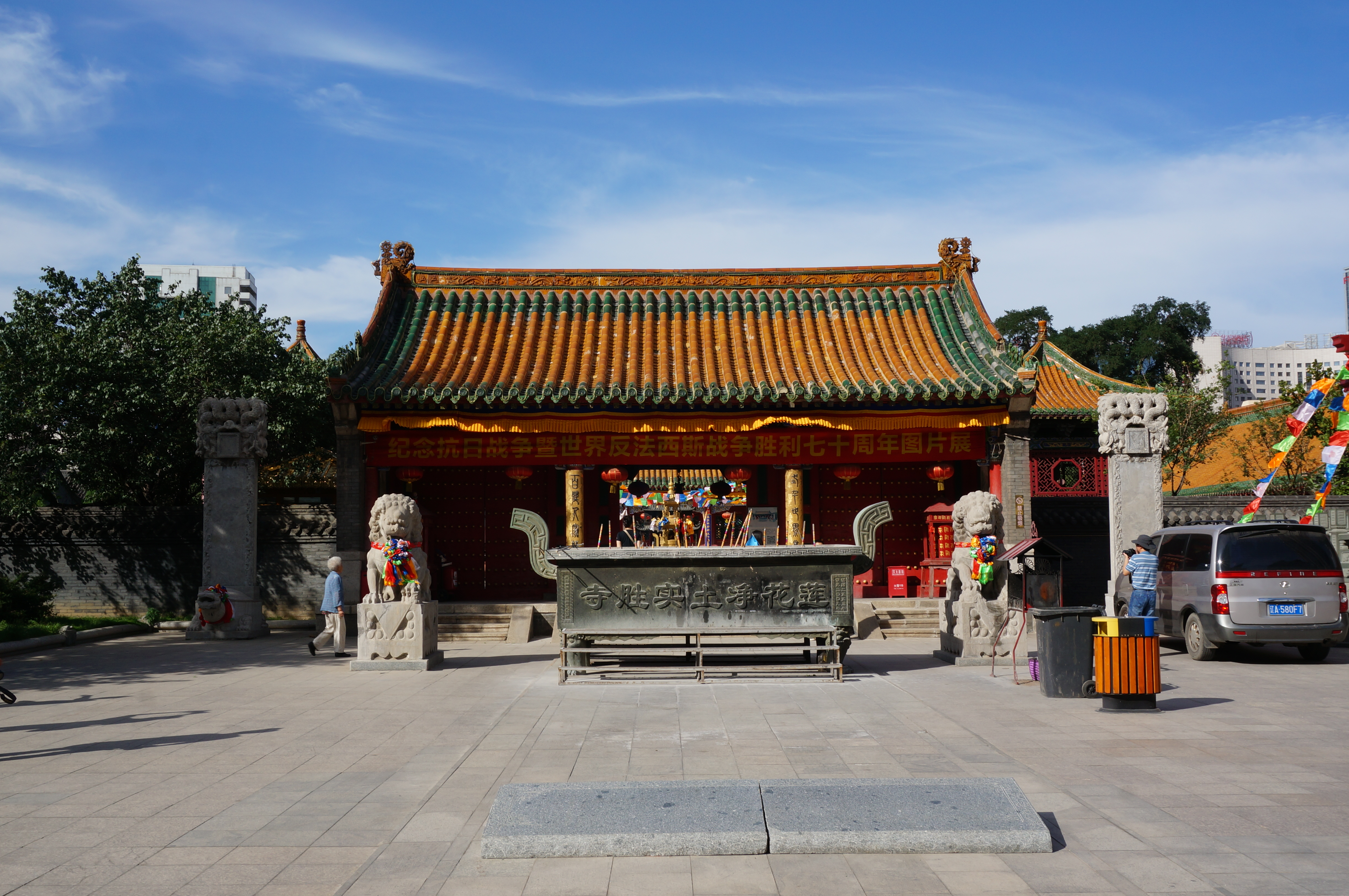 沈阳实胜寺，山门南侧。